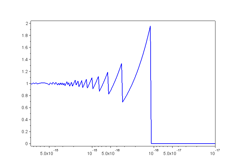 Gráfico de ((1+x)-1)/x implementado em sistema de numeração de ponto flutuante 'double'